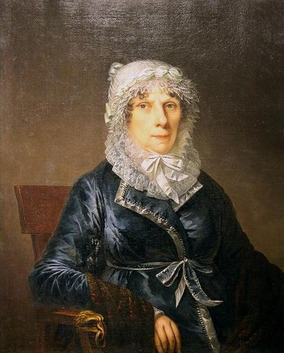 Елизавета Андреевна Аракчеева (1750 - 1820), ур. Витлицкая